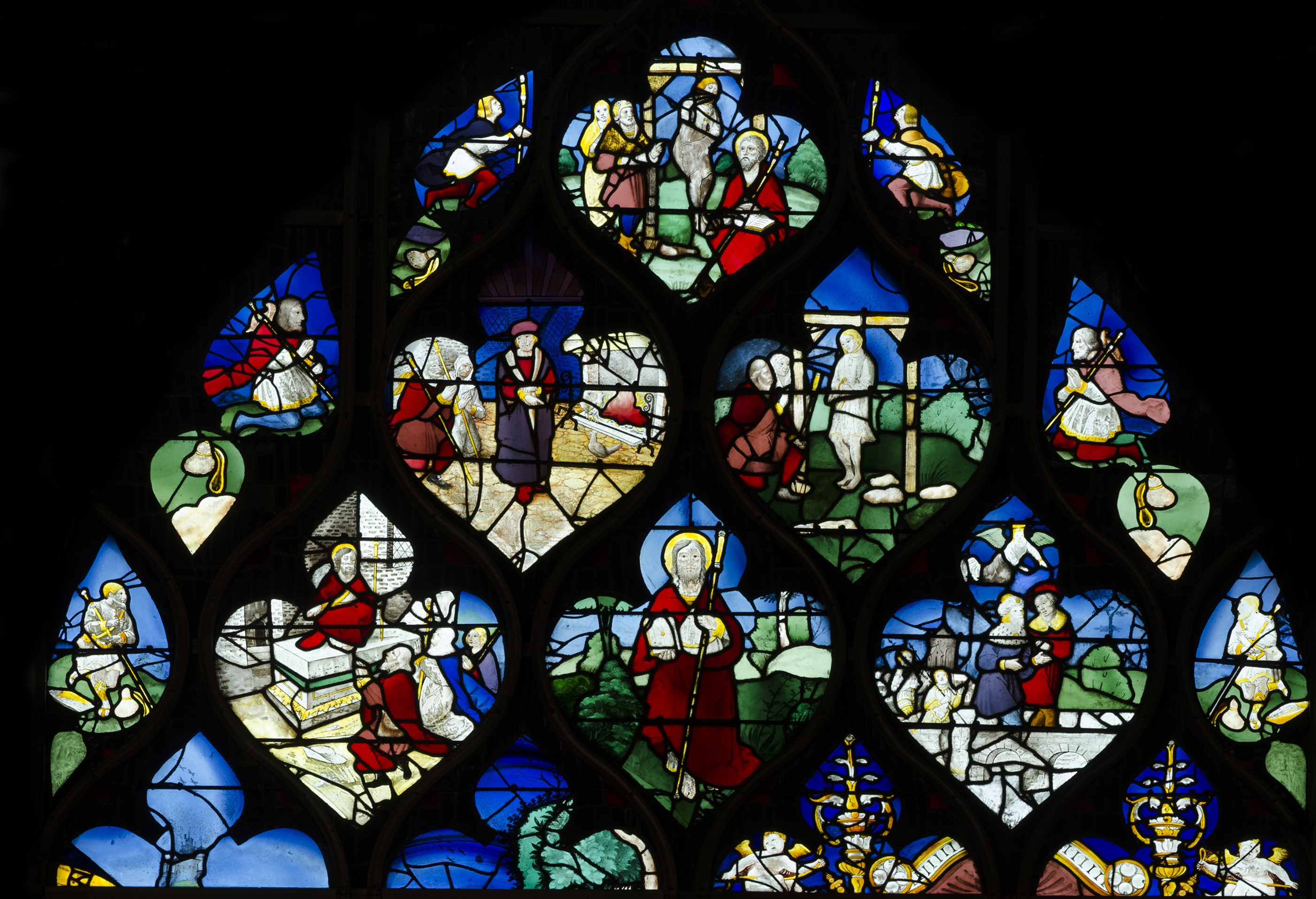 Verriere dite de la vie de Sainte Anne, au dessus le miracle du pendu dépendu